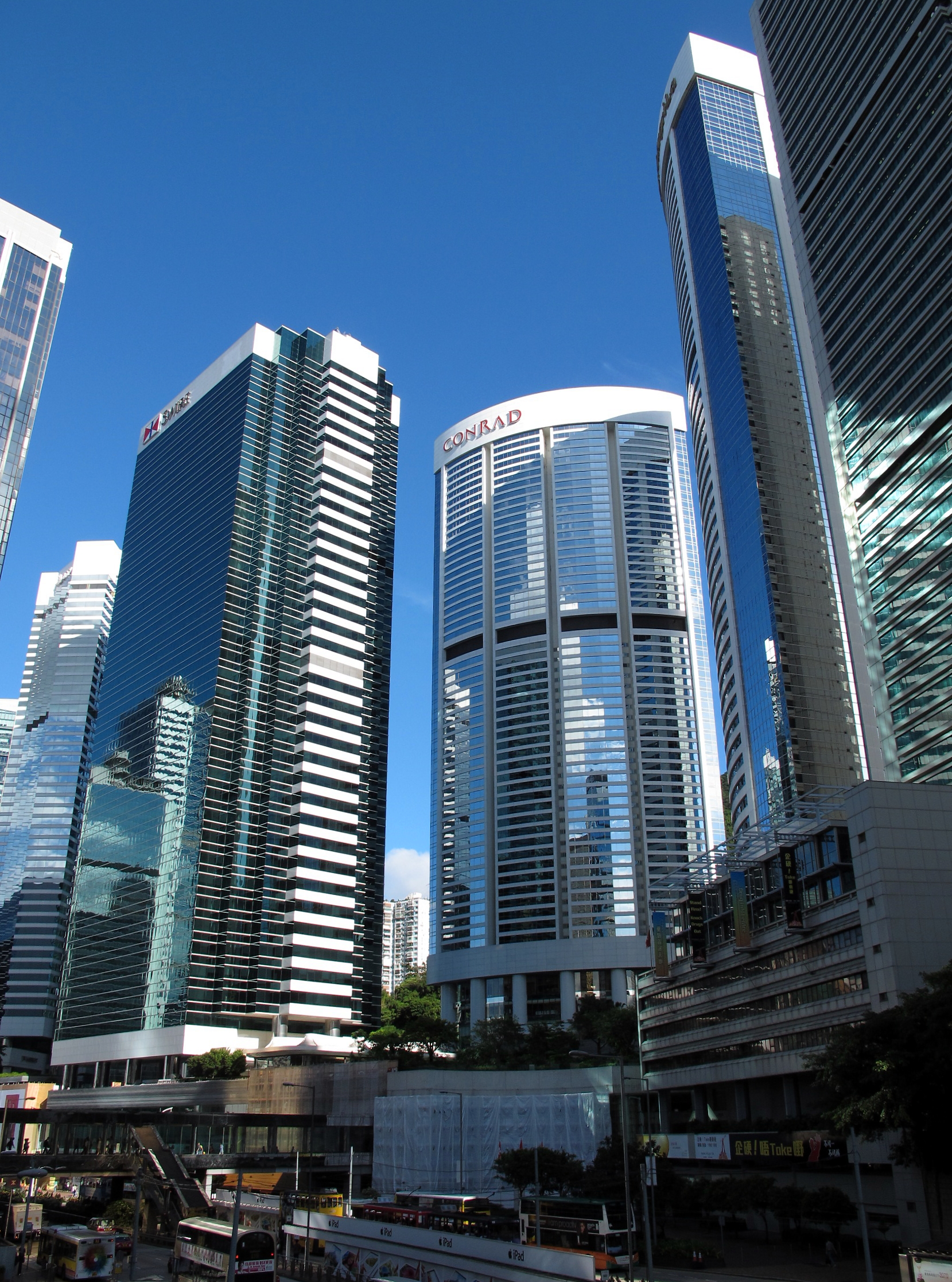 HK Pacific Place 太古廣場